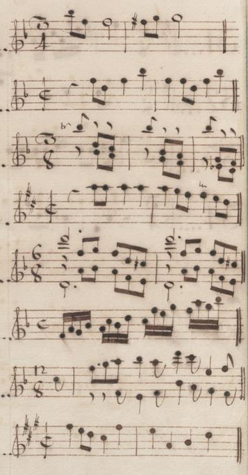 Table du volume X des manuscrits de Venise (incipit des sonates 23 à 30, K. 440 à 447).